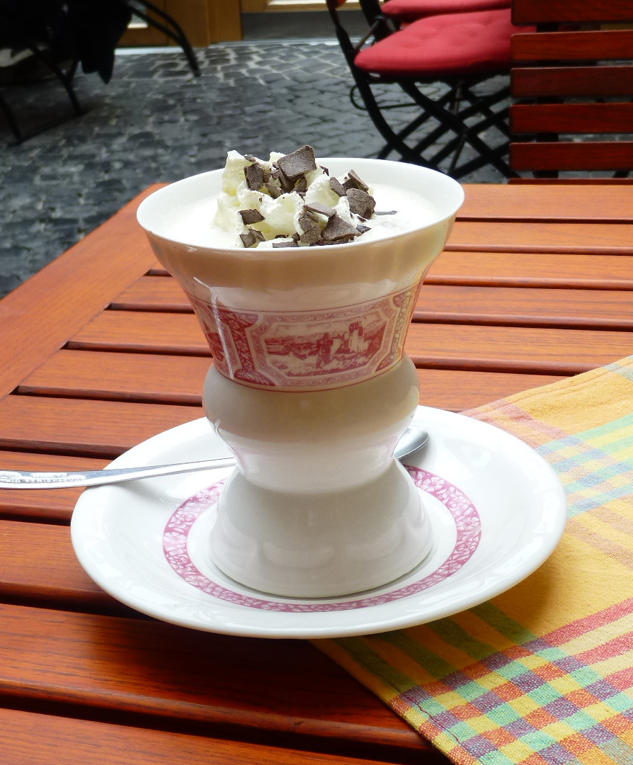 Le café alcoolisé selon la recette de Rüdesheim am Rhein, toujours servi dans cette tasse rose.